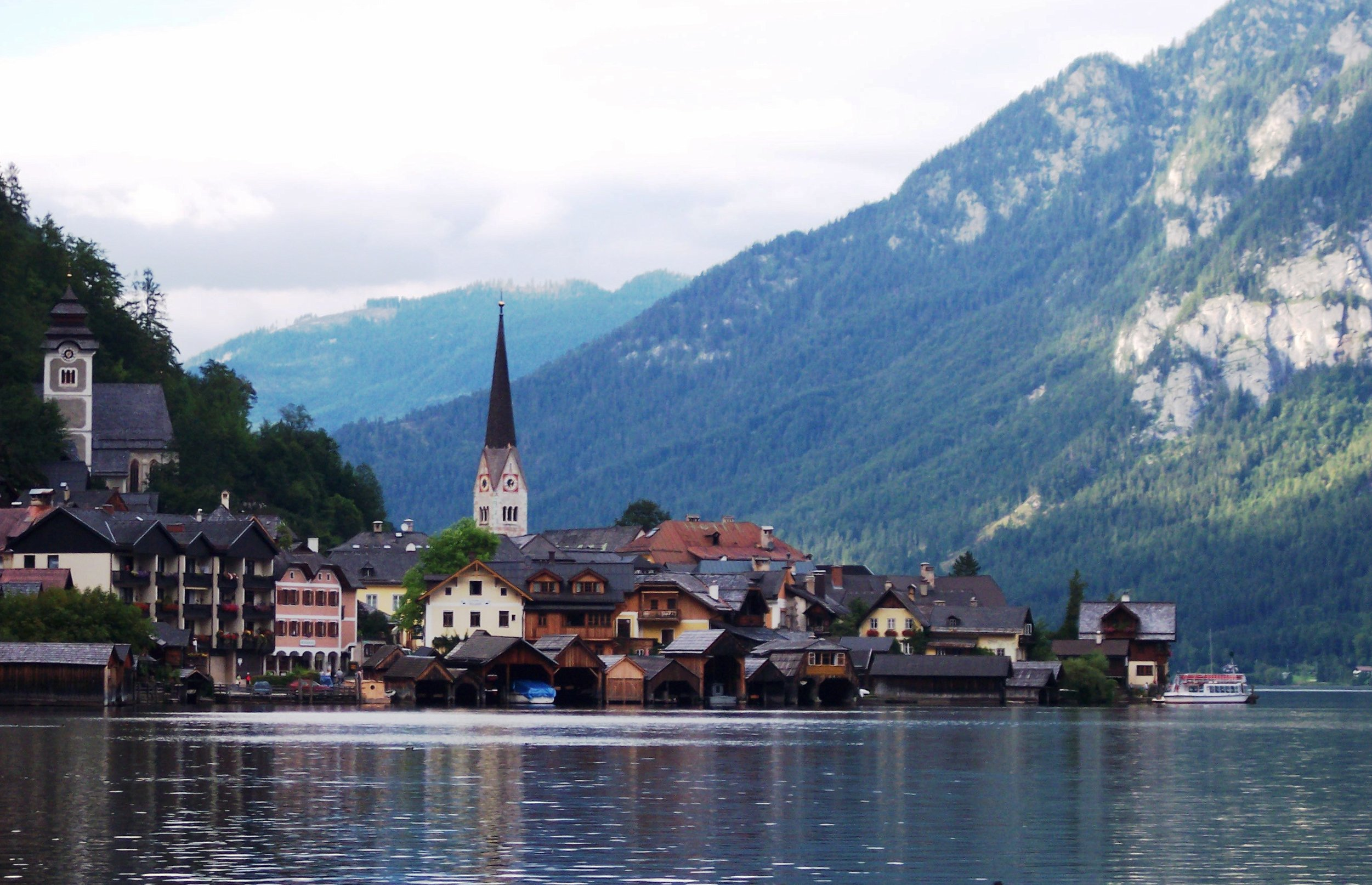 Hallstat (Austria)